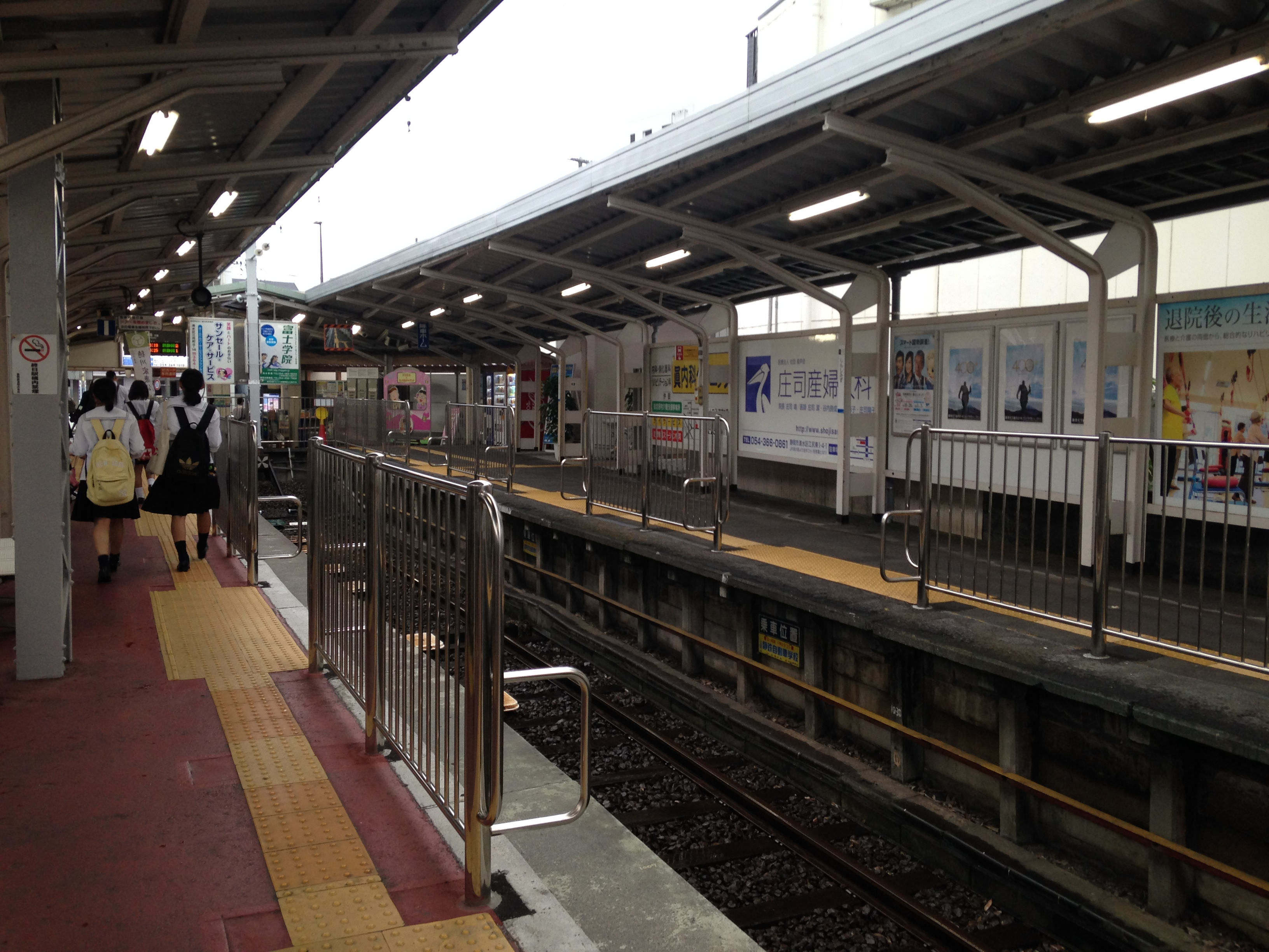 新清水駅のホーム